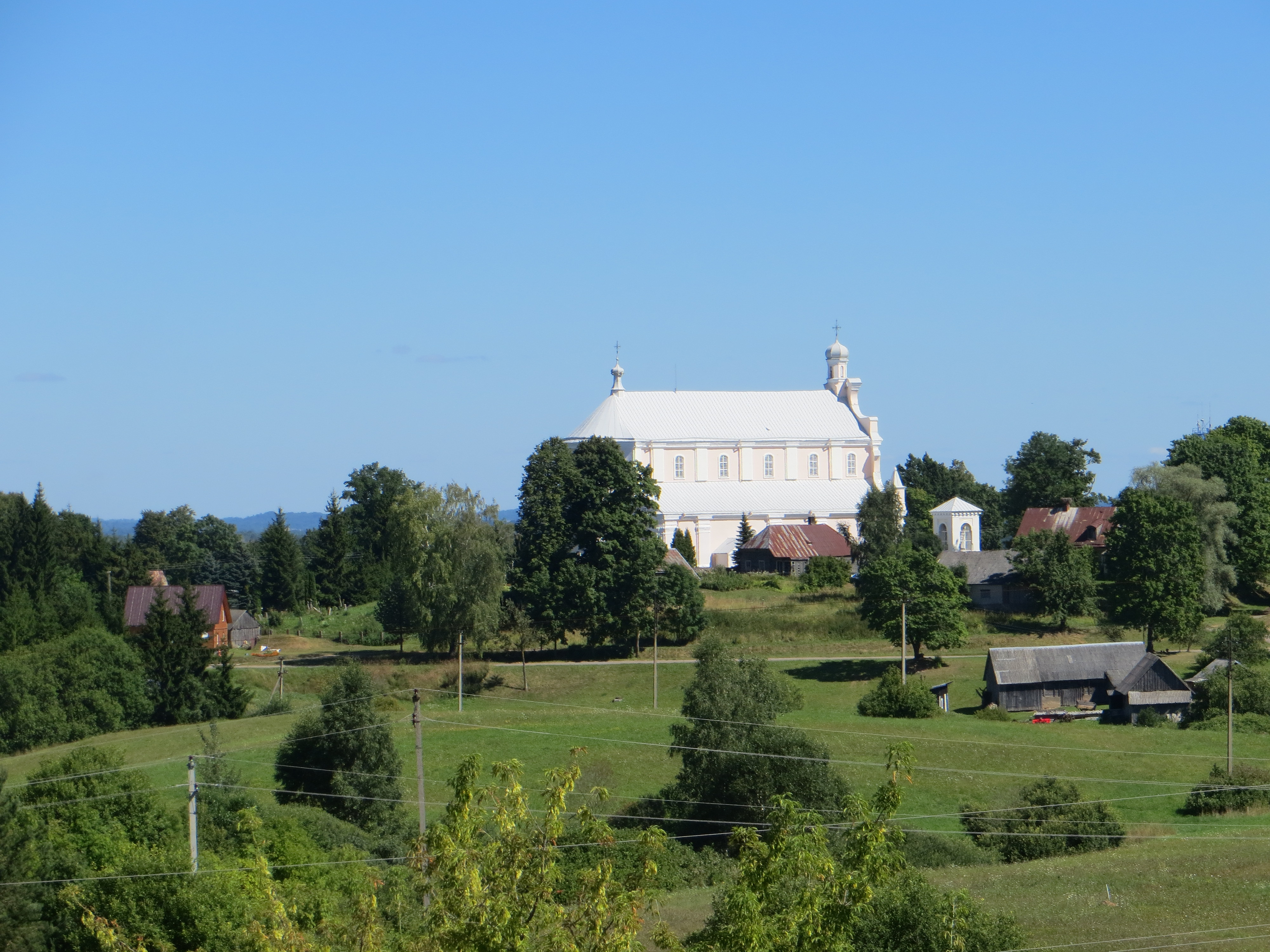 Jūžintai, Lithuania